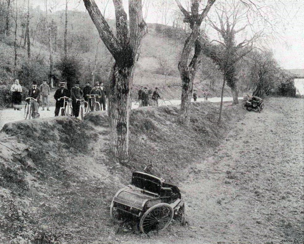 L'accident mortel du marquis de Montaignac à la Course de Périgueux (1er mai 1898). Au premier plan la Benz de Montariol, indemne, également dans le fossé. Les mécaniciens A. Hezard -essentiellement- et B. Lestages sont blessés. Les deux véhicules sont partis les derniers. Les 800 kilos de celui de de Montaignac lui ont enfoncé la cage thoracique et brisé les jambes.